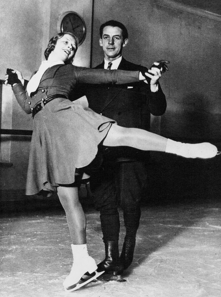 Melle Melita Brunner, championne de patinage à Vienne et M. Paul Krekov, champion de Berlin faisant une figure : ils se marient à Londres : [photographie de presse] / Agence Mondial